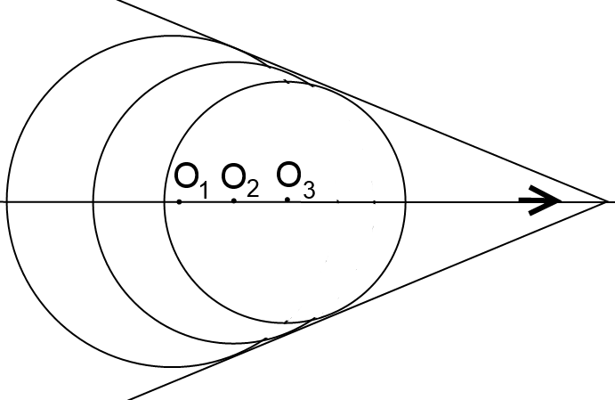 Deplasarea sursei sonore 3